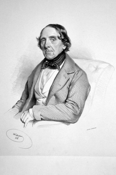 Heinrich Teltschik (1801-1878), Abgeordneter zum Reichstag in Kremsier. Lithographie von Josef Kriehuber, 1848